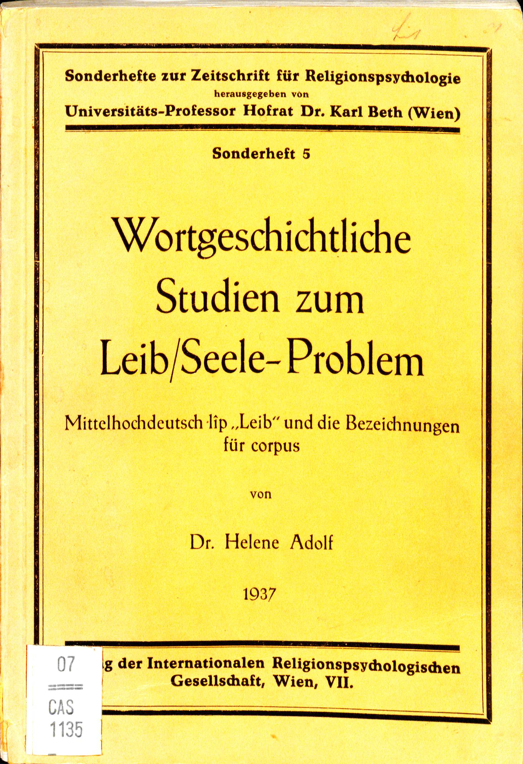 Helene Adolf Mittelhochdeutsch 1937 Einband